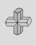 Staurolith-Durchdringungszwilling